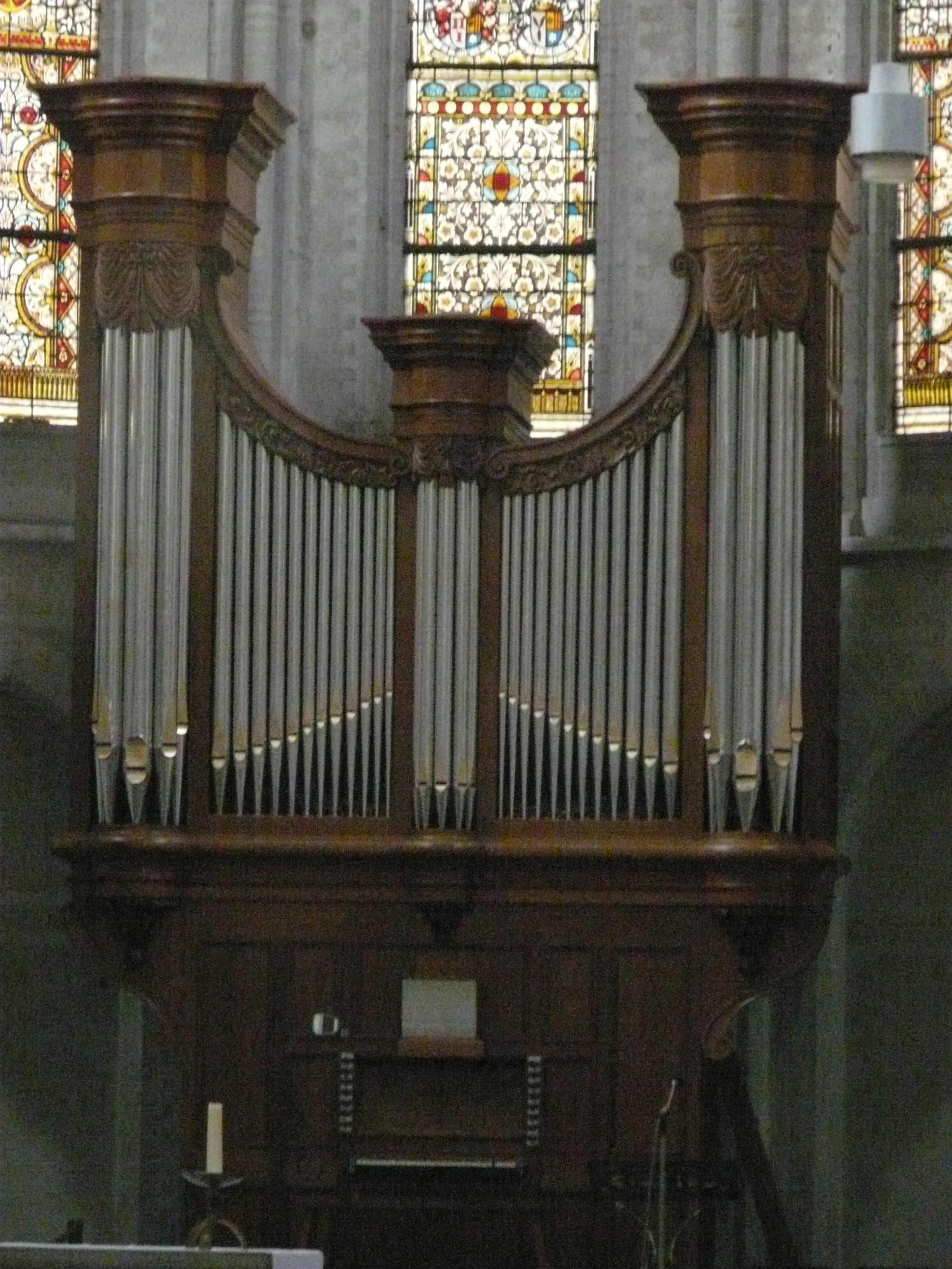 Sint-Laurentiuskerk in Ulvenhout